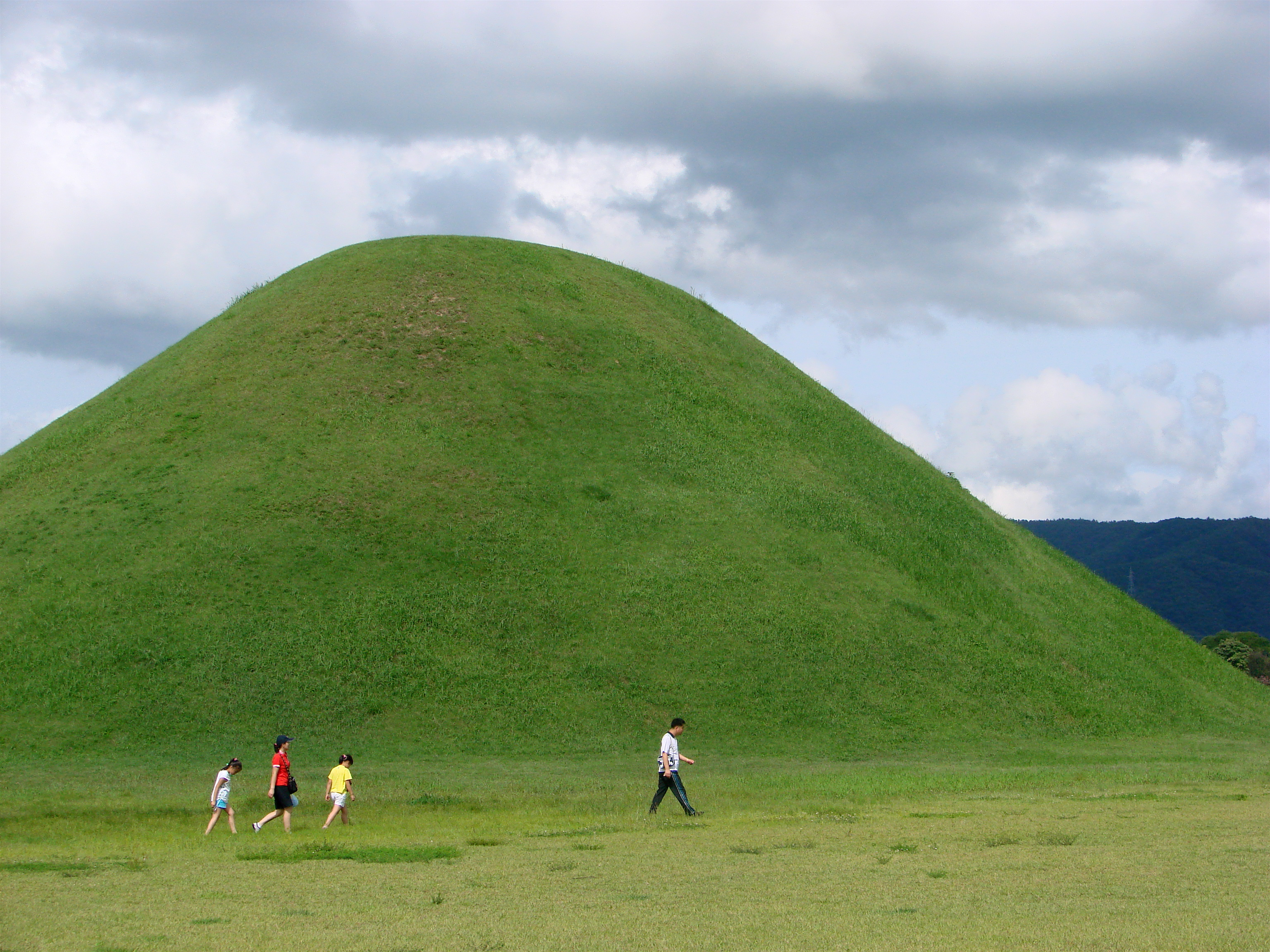 Tomb of a Silla king.